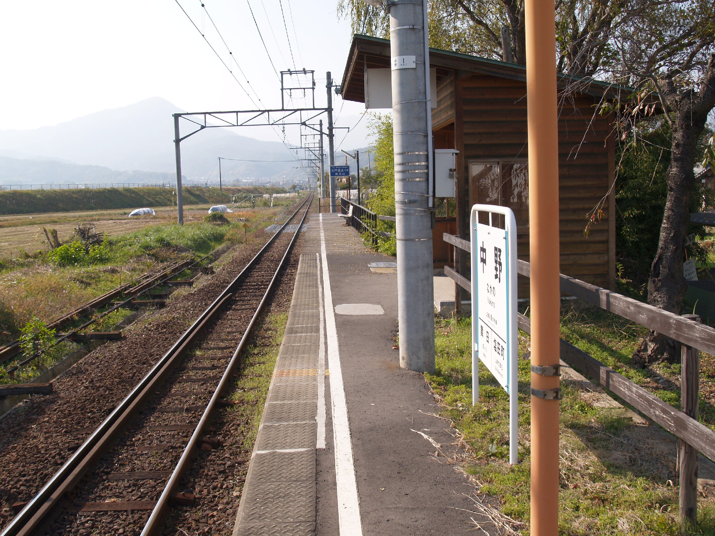 中野駅ホーム